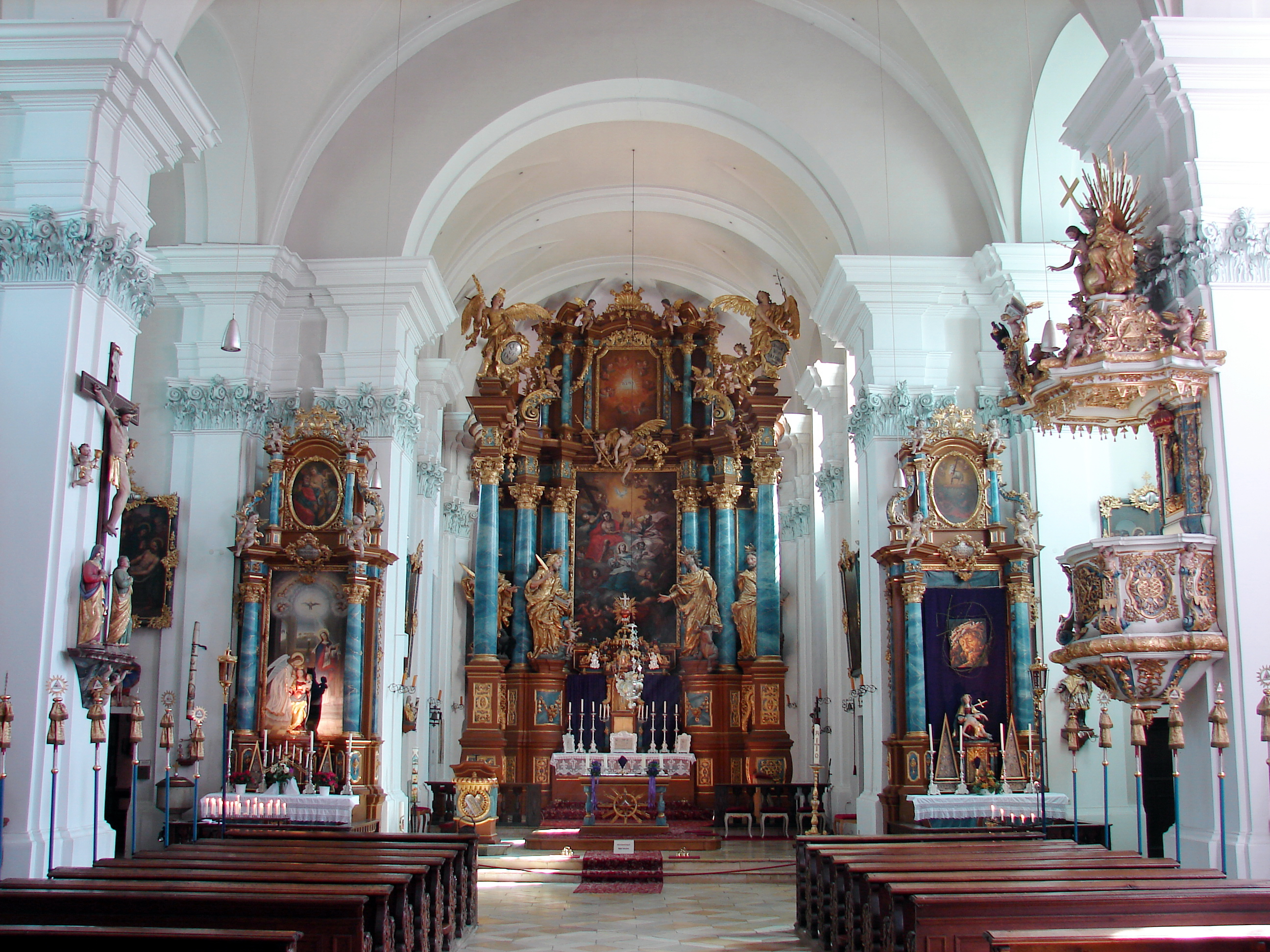 Die Kirche ist ein Barockbau des Graubündner Baumeisters Giovanni Battista Camessina, der im Dienst des benachbarten Eichstätter Hochstifts stand. Sie entstand 1697 bis 1711 und umfasst auch den Vorgängerbau, eine kleine Kapelle, die zwischen 1693 und 1695 entstand und das Gnadenbild Die Krönung Mariens durch die hl. Dreifaltigkeit des Malers Johann Held aus Stadtamhof enthält.